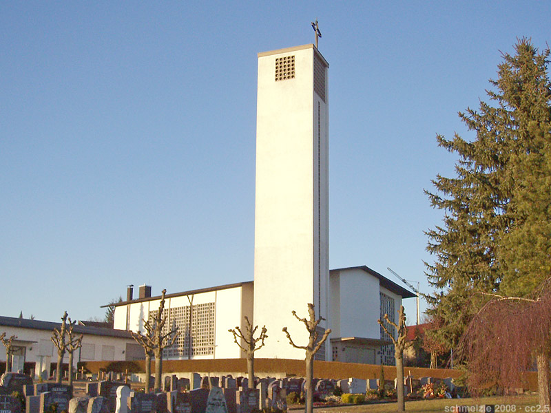 Katholische Pfarrkirche Mariä Geburt in Eppingen-Richen